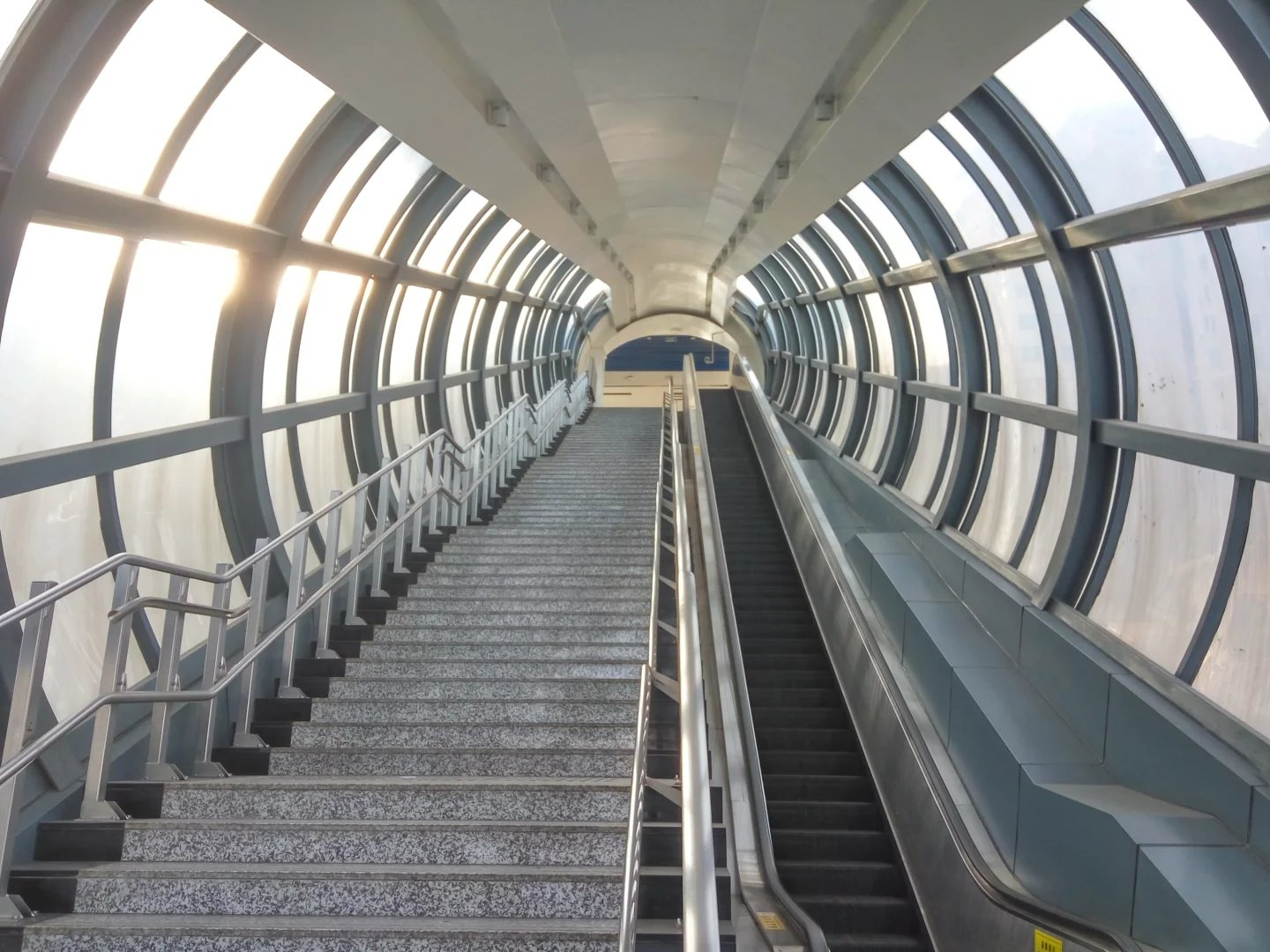 长春轨道交通4号线南三环站出入口